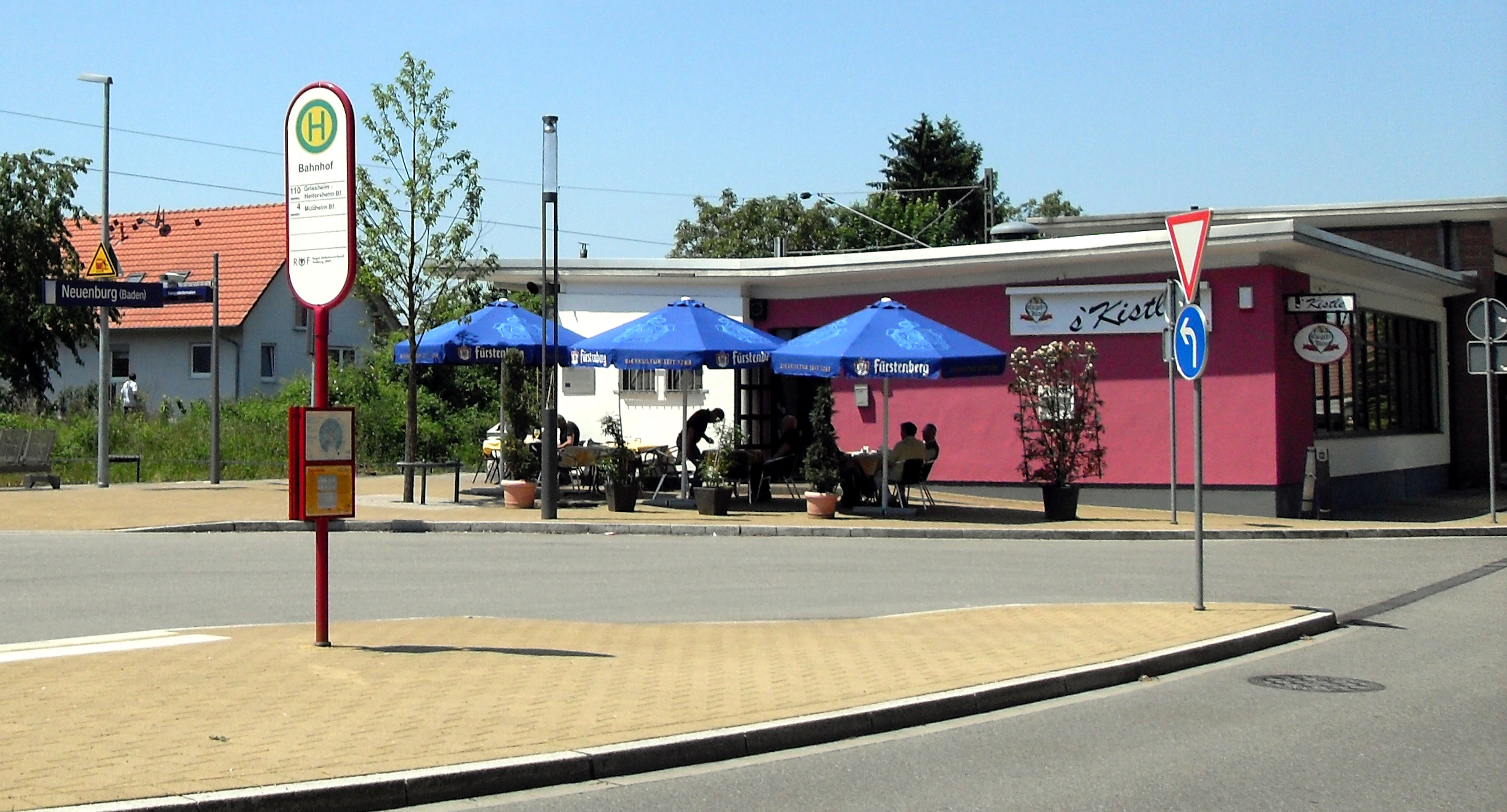 Bahnhof Neuenburg (Baden)